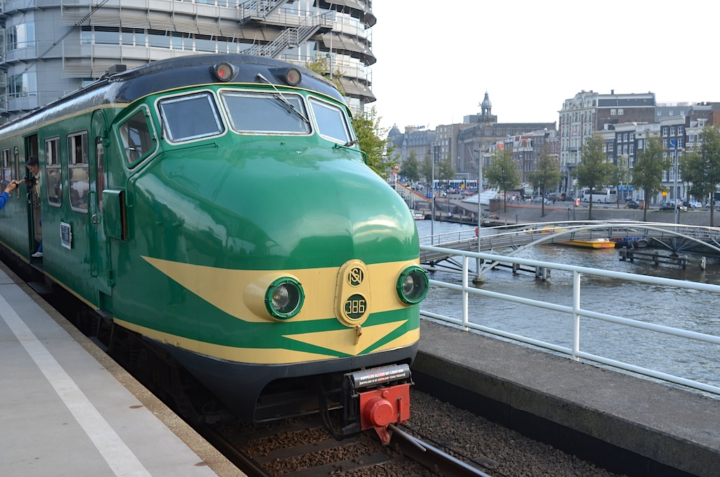 Treinstel NS 386 ('Hondekop') op spoor 1 te Amsterdam Centraal, met uitzicht op de Prins Hendrikkade. Foto: Erik Swierstra.